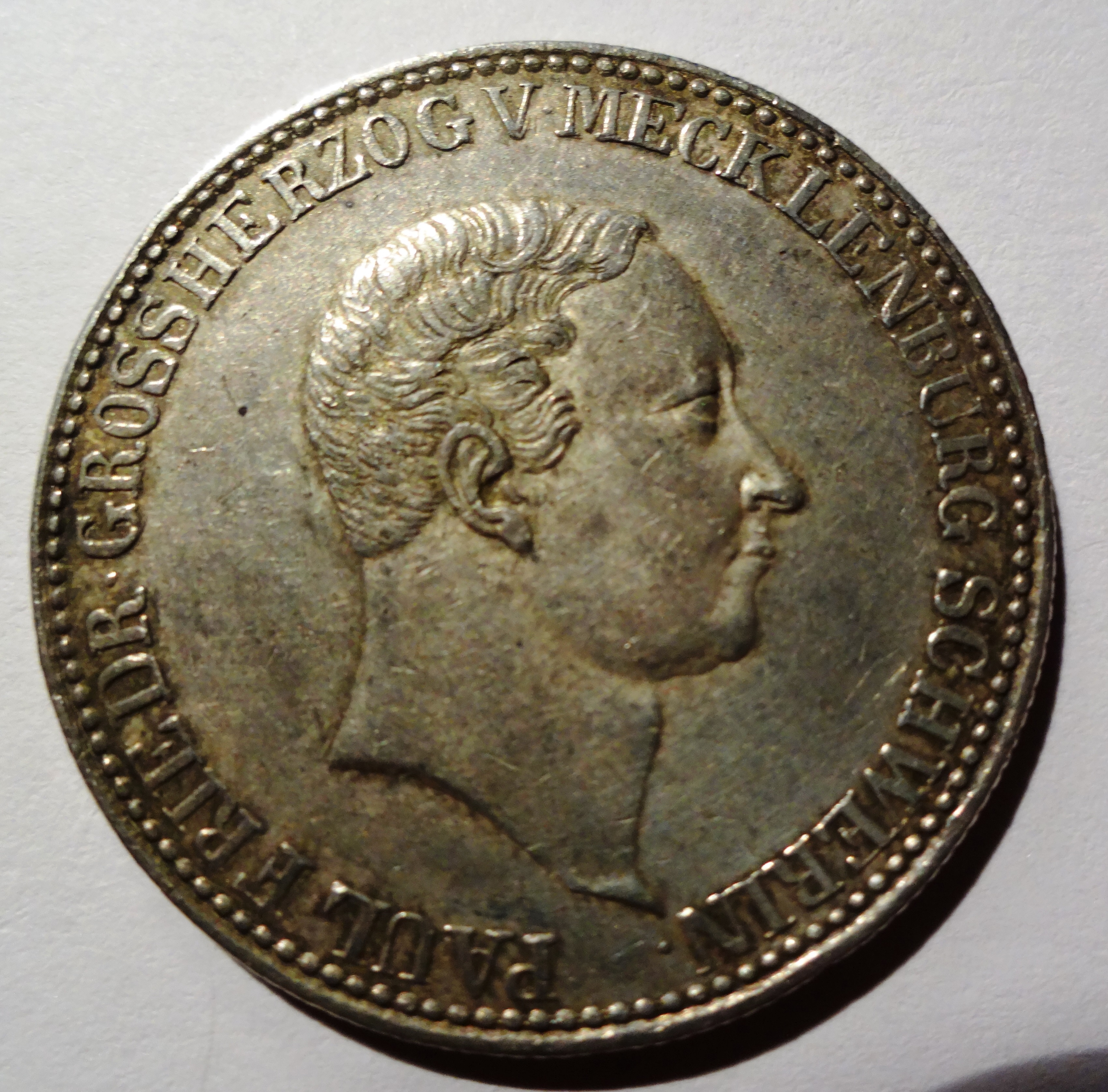 Paul Friedrich auf Mecklenburg-Schweriner Gulden von 1840